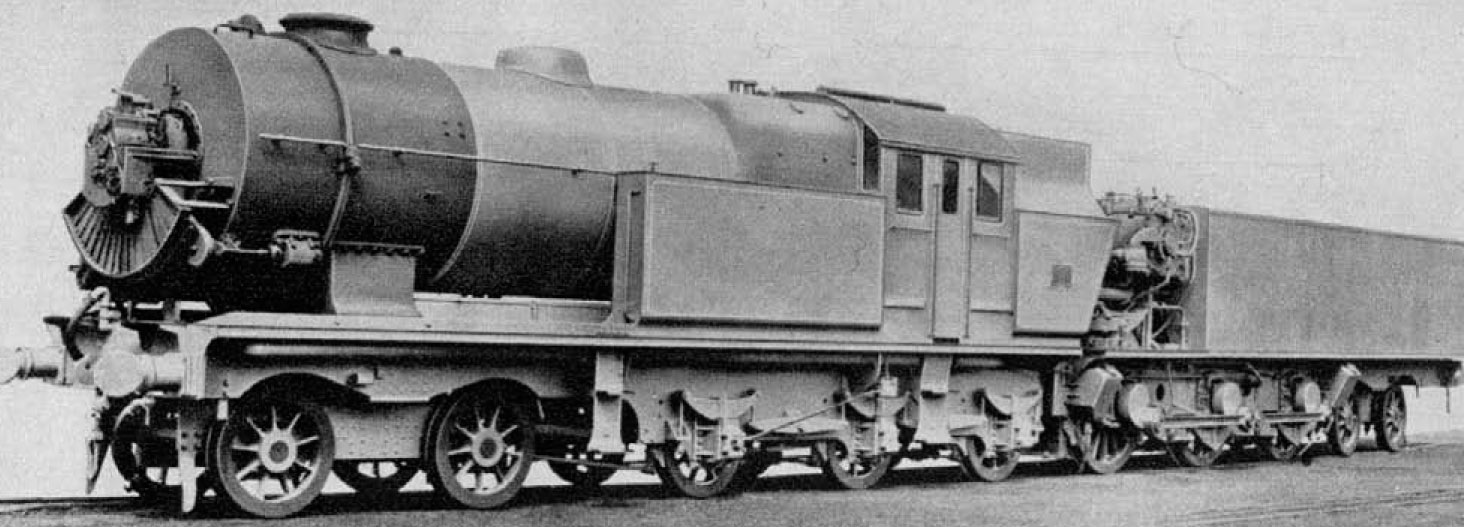 Bröderna Fredrik och Birger Ljungströms ångturbindrivna lokomotiv med Ljungströms luftförvärmare, tillverkat omkring 1925-1927.